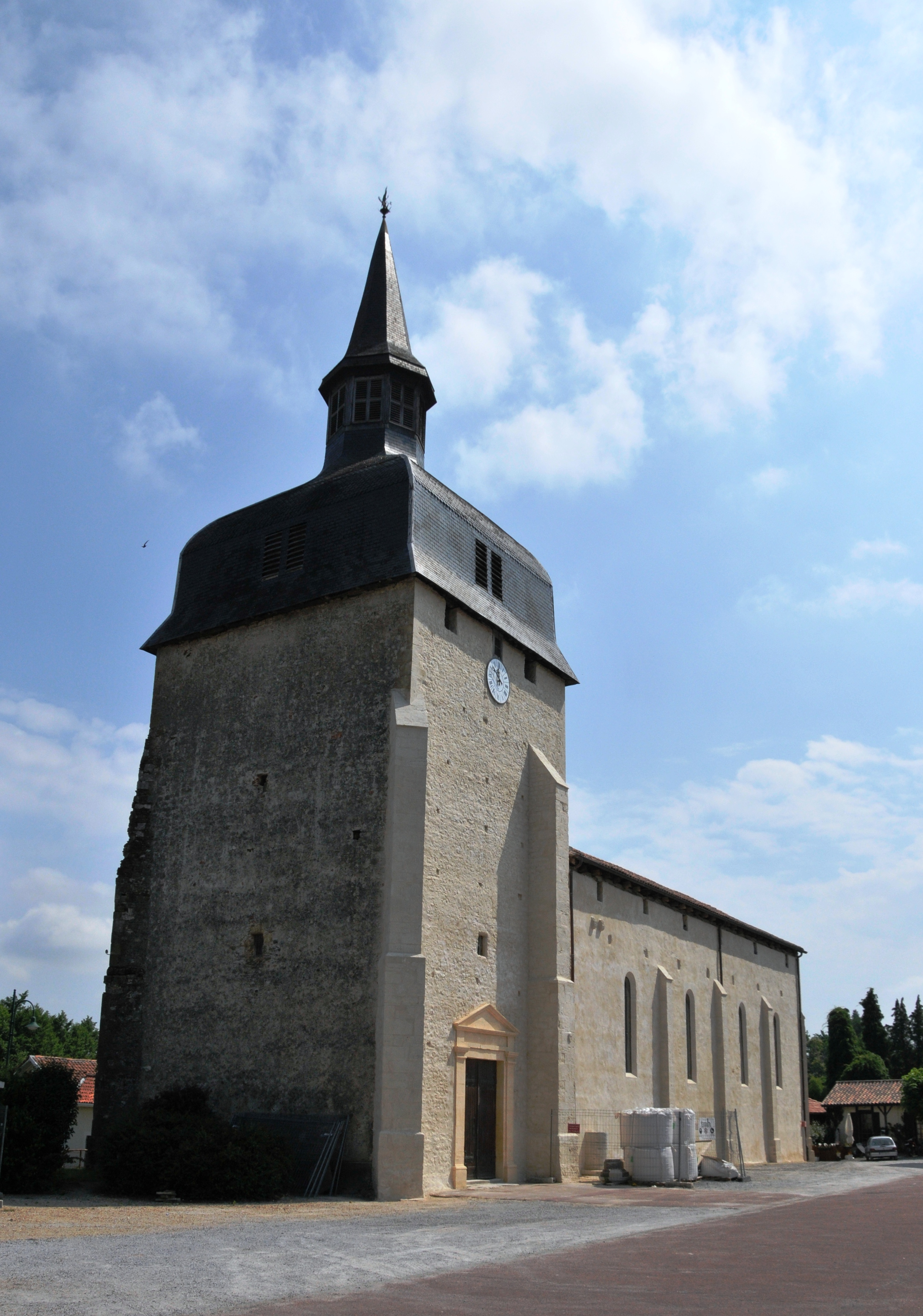 Kirche in Magescq